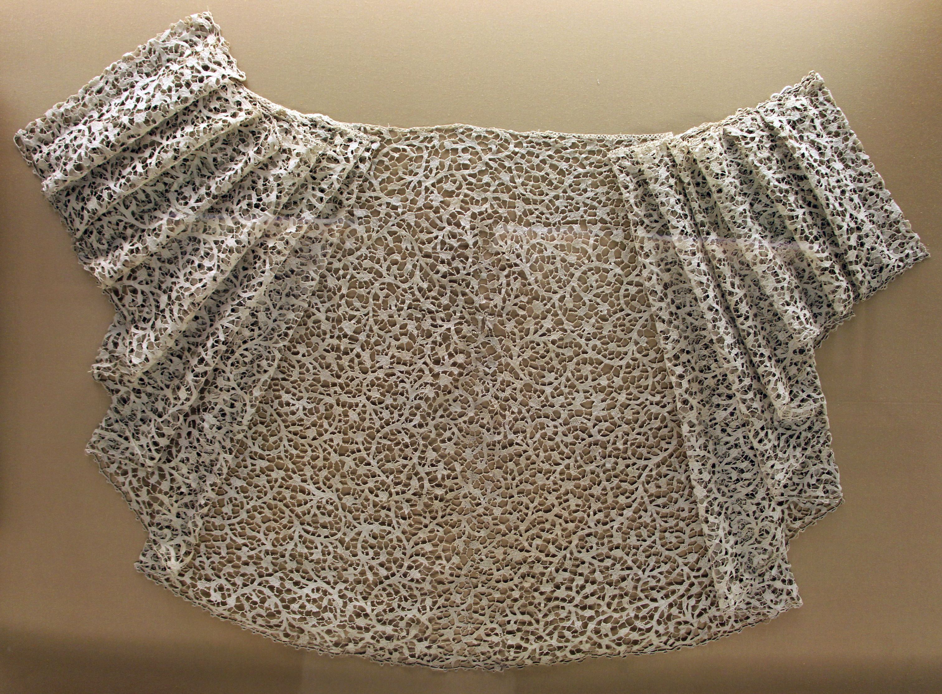 Museo della Casa fiorentina Antica - Palazzo Davanzati - MIBAC The making of this document was supported by Wikimedia CH. (Submit your project!) For all the files concerned, please see the category Supported by Wikimedia CH. This is a photo of a monument which is part of cultural heritage of Italy.